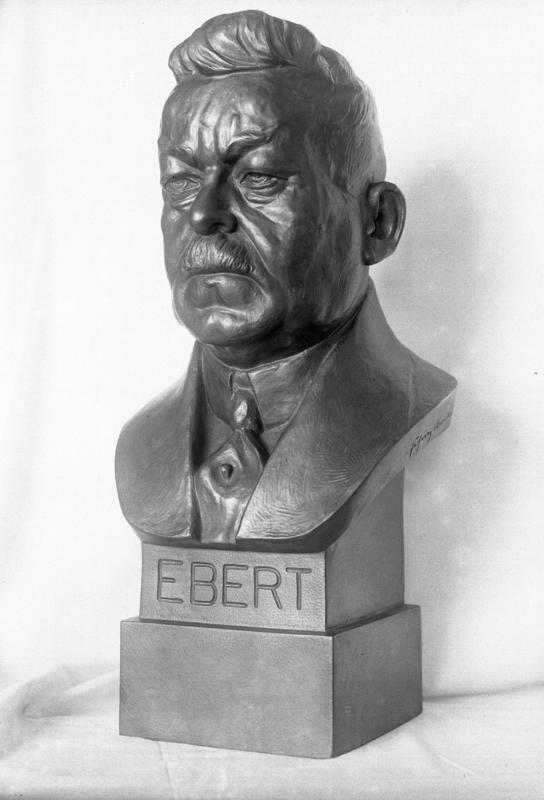 Eine Büste des verstorbenen ersten Reichspräsidenten Friedrich Ebert ! Die Broncebüste des verstorbenen ersten Reichspräsidenten Friedrich Ebert, welche von dem Berliner Bildhauer Friedrich Brockmüller hergestellt wurde.